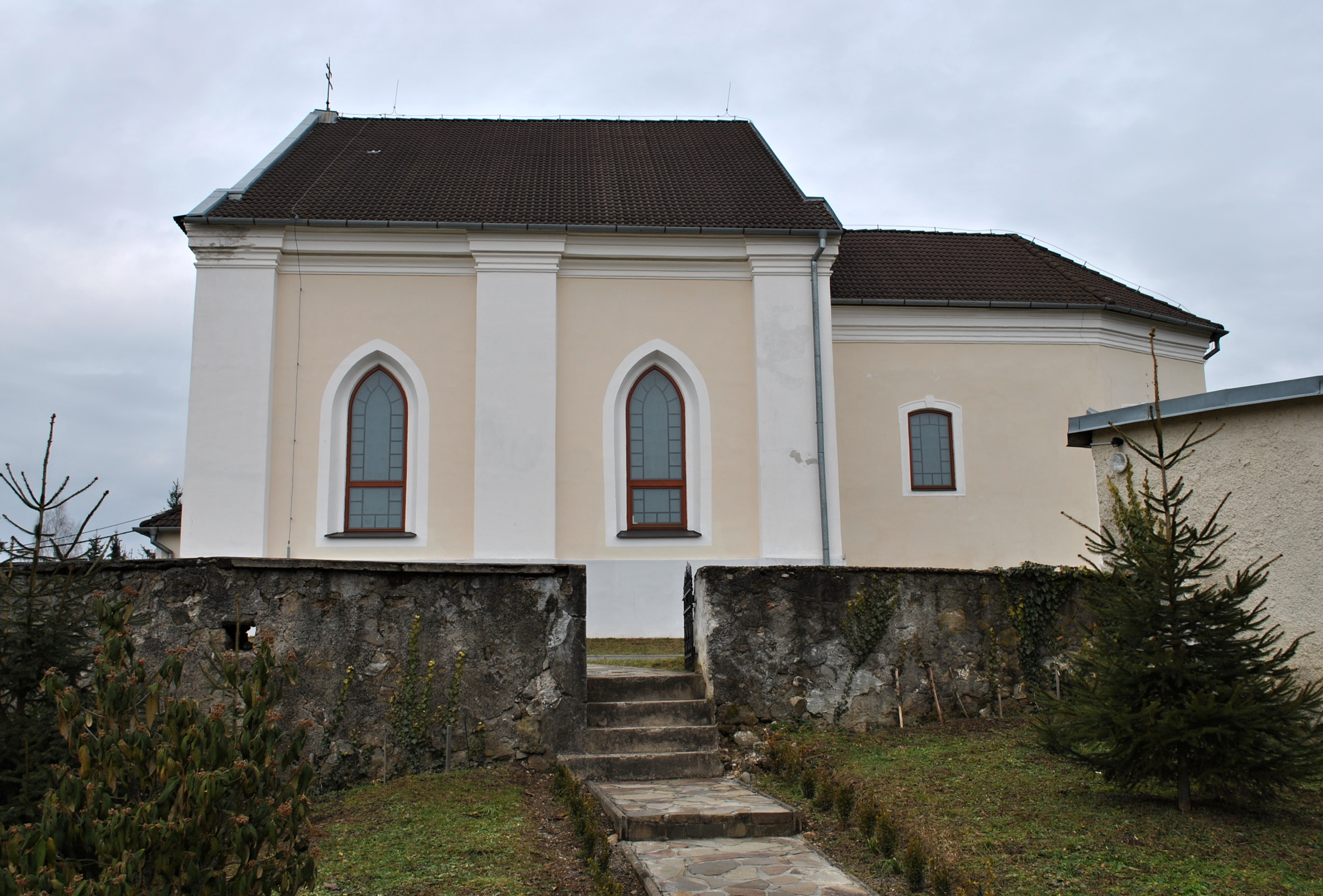 Badín (okr. Banská Bystrica), Kostol svätej Kataríny Alexandrijskej